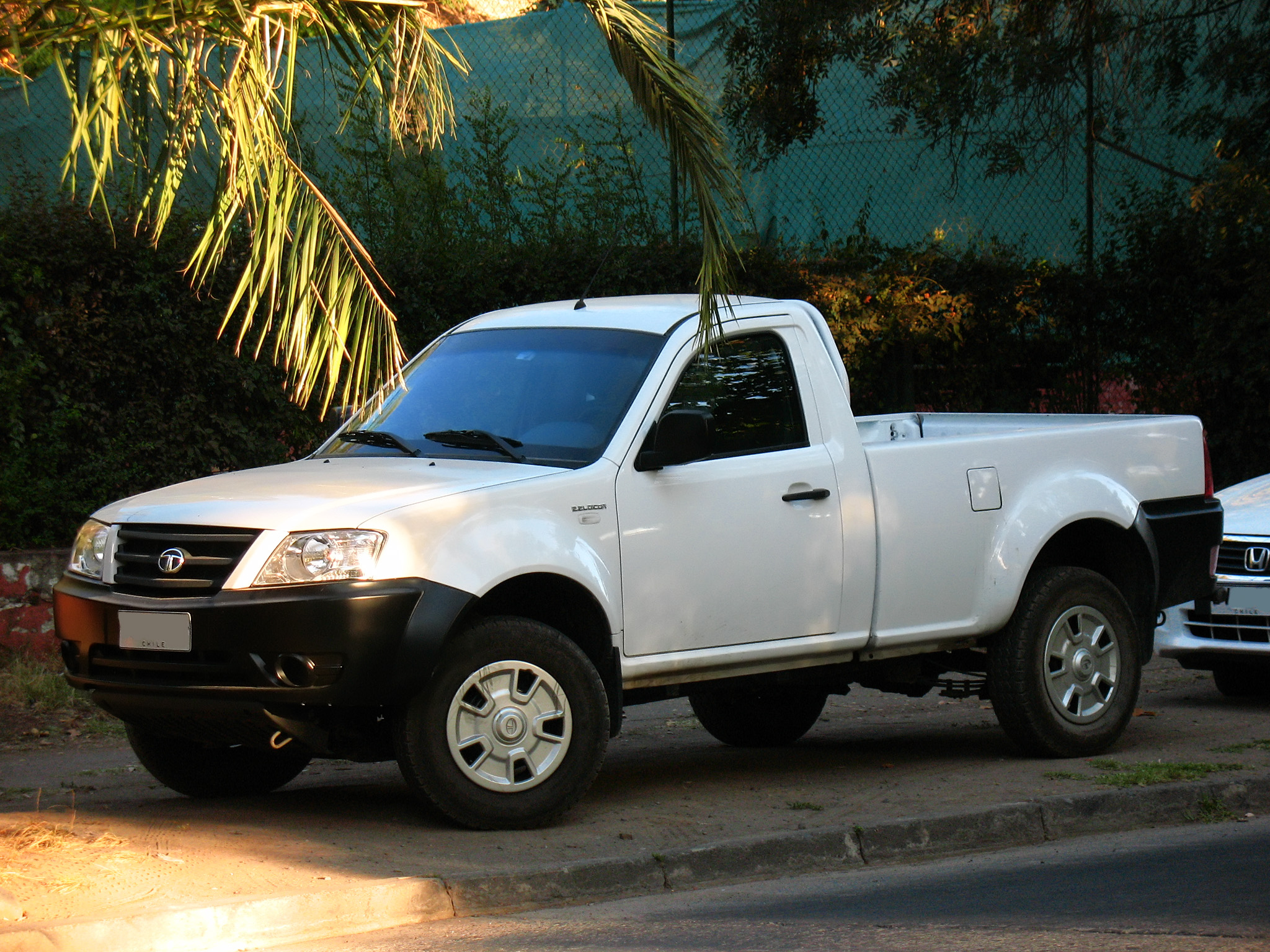 Tata Xenon DLE 2.2L Dicor 2013